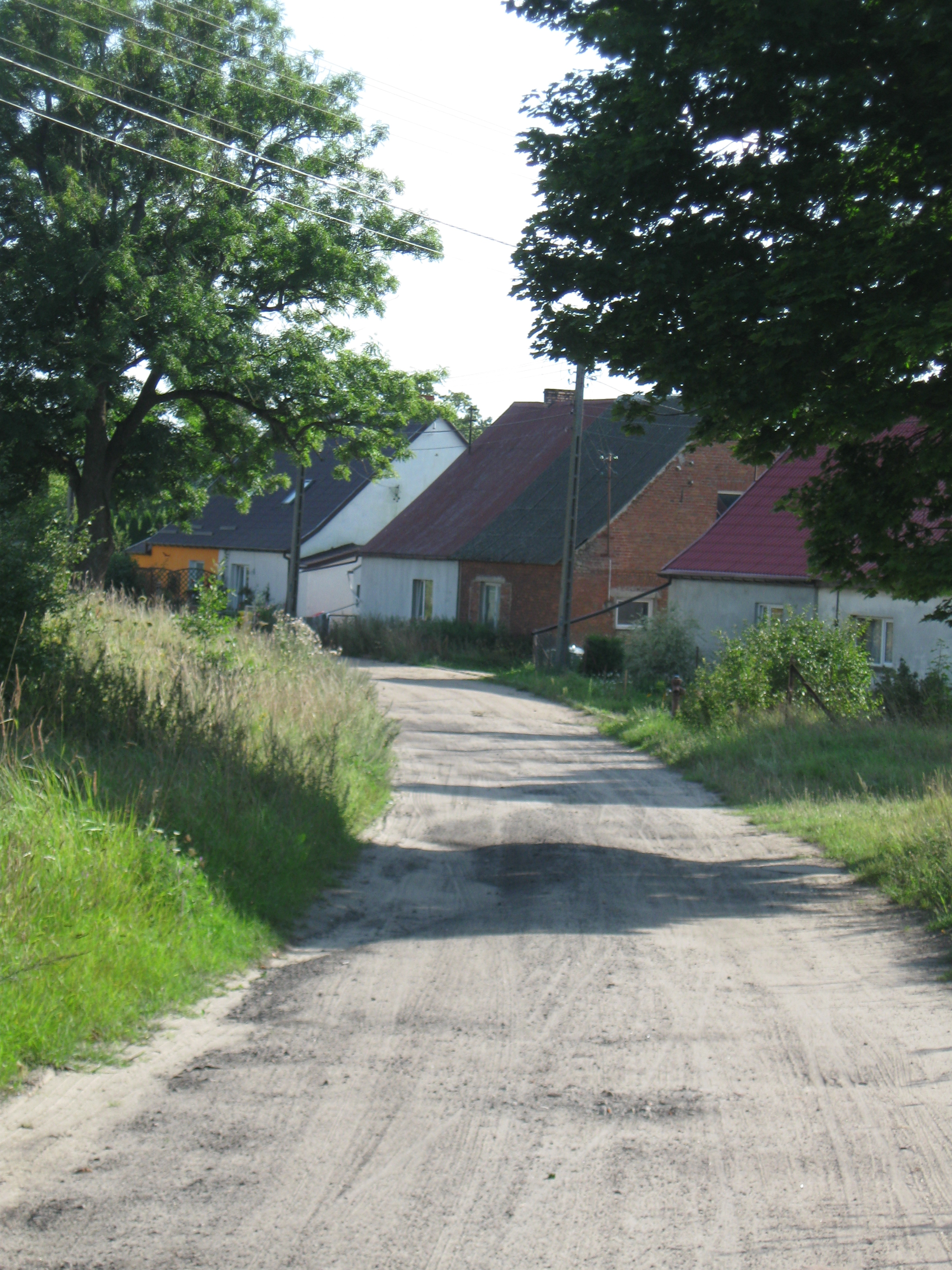 Kędrzyno - żużlowa szosa biegnąca do Wędzic